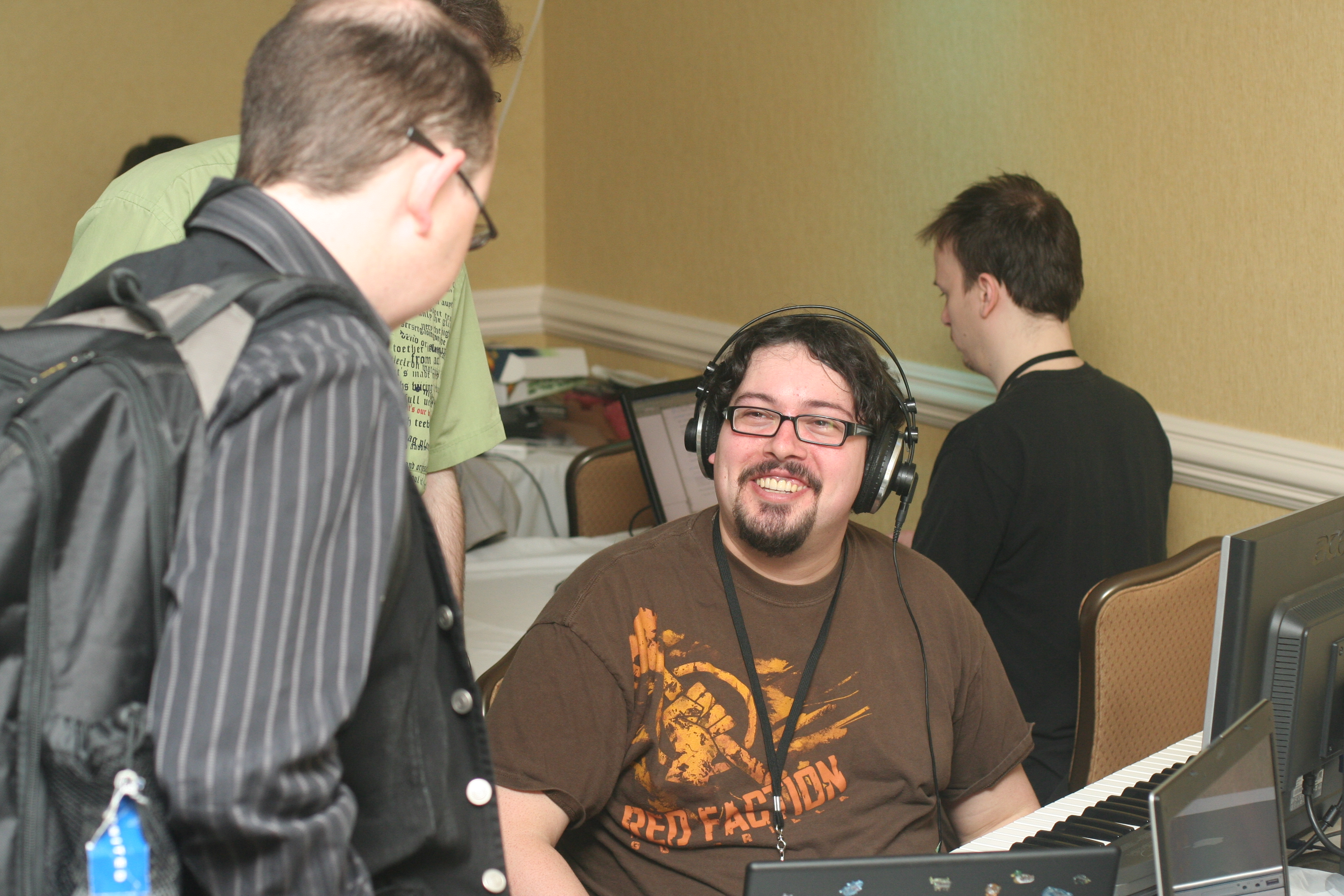 2009.04.Notacon